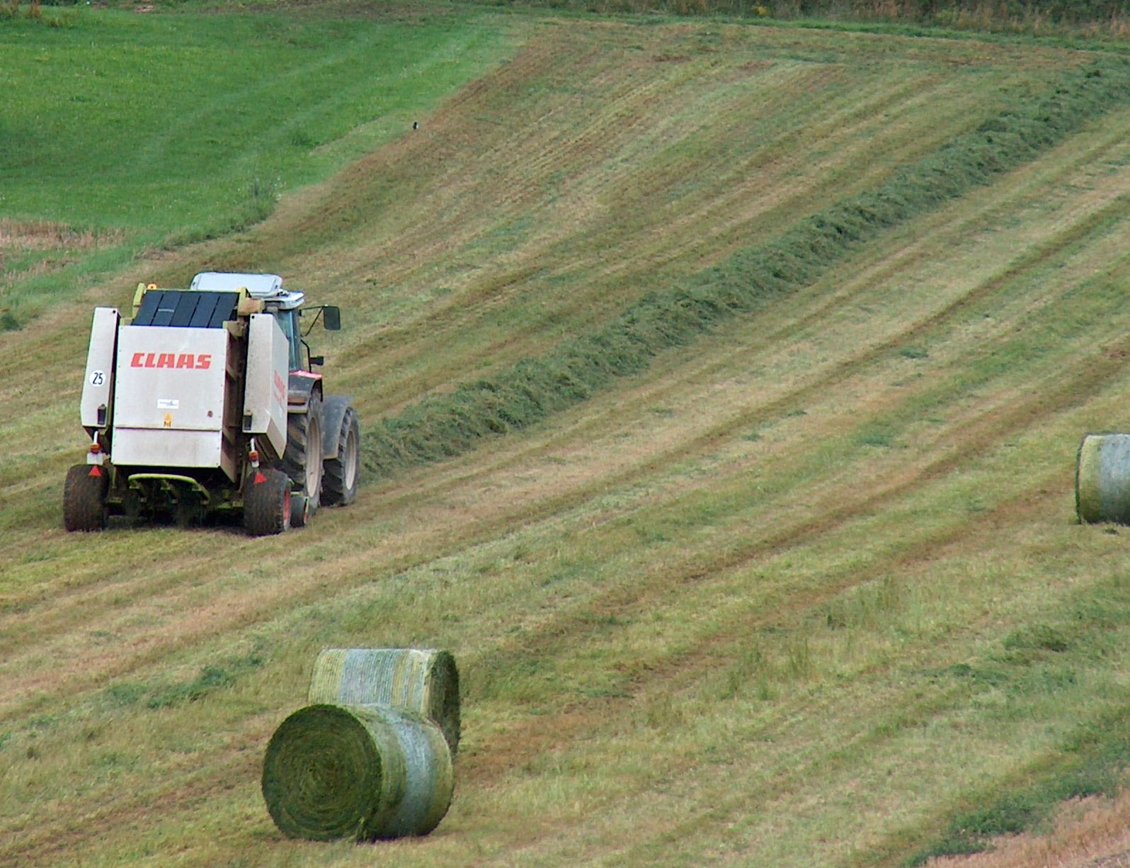 Claas-Rundballenpresse